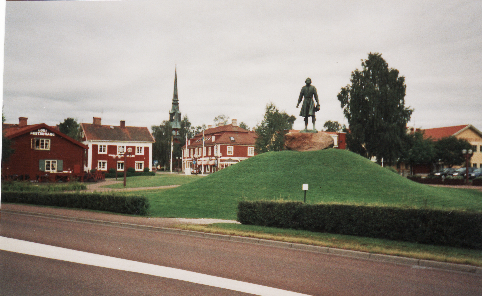 Беларуская (тарашкевіца): Мура, Швэцыя